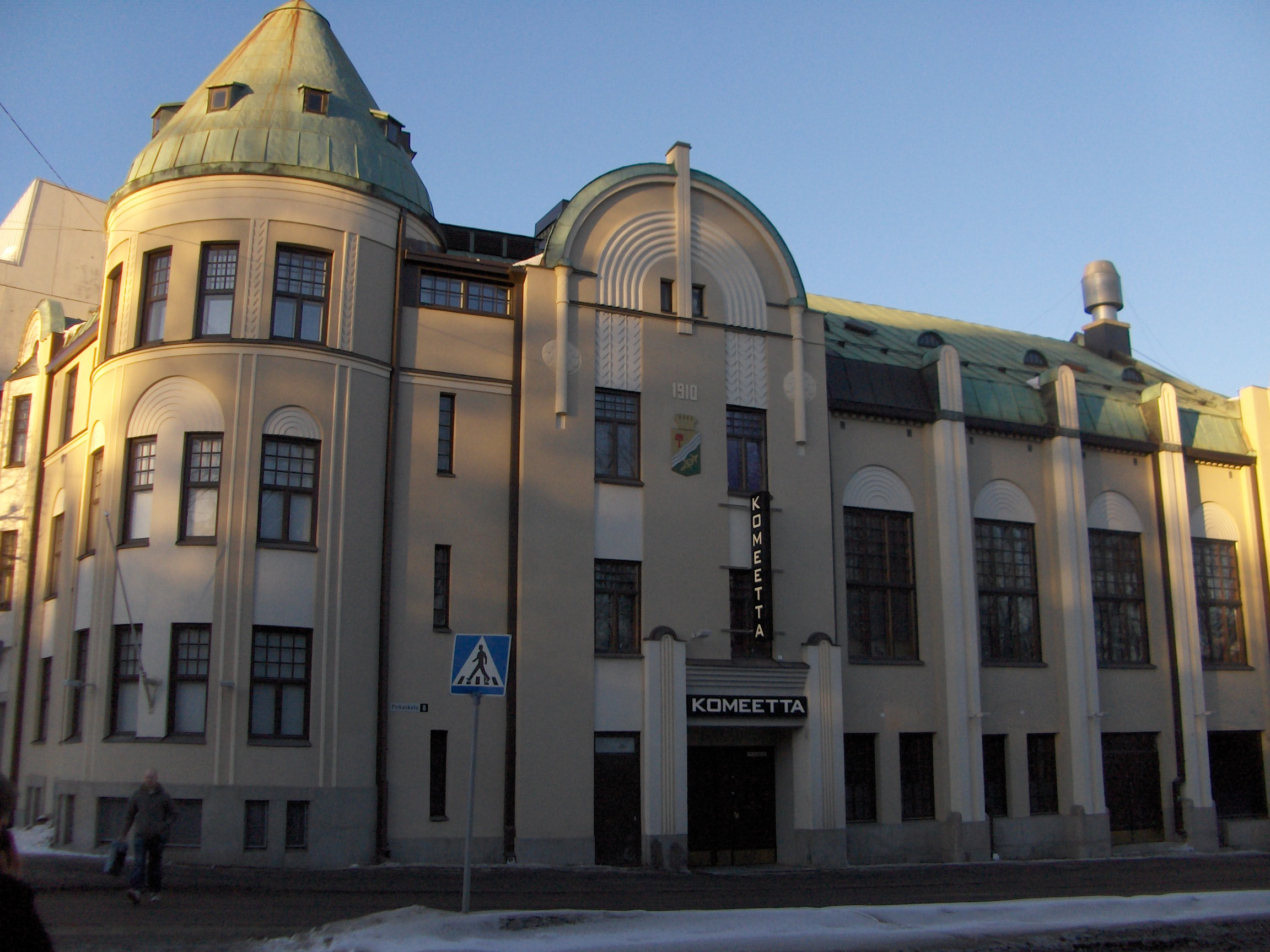 Tampere volunteer fire brigade